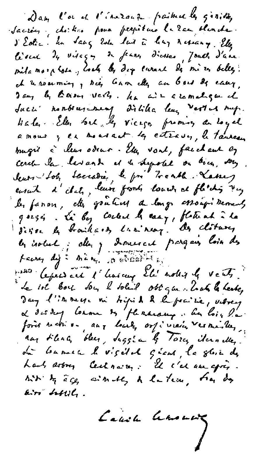 Dans l'or et l'émeraude... par Camille Lemonnier (1844-1913). Texte: "Dans l'or et l'émeraude paissent les génisses sacrées, choisies pour perpétuer la race blanche d'Éolie. Leur sang rose luit à leurs naseaux. Elles lèvent des visages de jeunes déesses, jouets d'une métamorphose. Toutes les dix eurent des mères belles et renommées, nées comme elles au bord des eaux, dans les limons verts. Un air aromatique et sucré nombreusement distilla leurs vertus nuptiales. Elles sont les vierges promises au royal amour ; en mouvant ses entraves, le taureau mugit à leur odeur. Elles vont, fauchant en cercle la lavande et le serpolet, ou bien, sous leurs soles saccadées, le pré tremble. Lasses ensuite d'ébats, leurs fronts lourds et fléchis vers les fanons, elles goûtent de longs assoupissements gorgés. Là-bas coulent les eaux, flottant à la dérive des brouillards lumineux. Des clôtures les isolent ; elles y demeurent parquées loin des [...]. Cependant l'heureux été mollit les vents. Le sol bout sous le soleil oblique. Toutes les herbes dans l'immense vie torpide de la prairie, vibrent et dardent comme des flambeaux. Au loin la forêt massive, aux lourdes orfèvreries vermeilles, aux silences bleus, suggère les forces éternelles. Là commence le végétal géant, la gloire des hauts arbres centenaires. Et c'est une après-midi des âges aimables de la terre, sous des airs subtils."